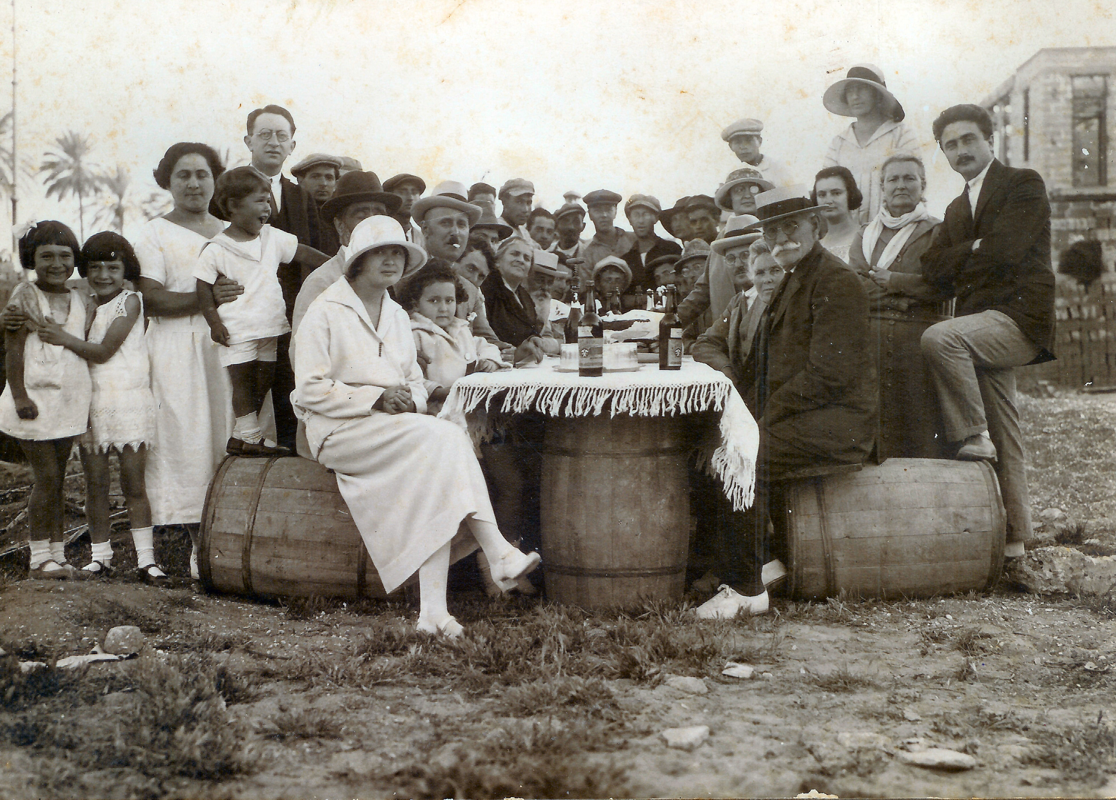 הנחת אבן הפינה ברחוב לוינסקי 69